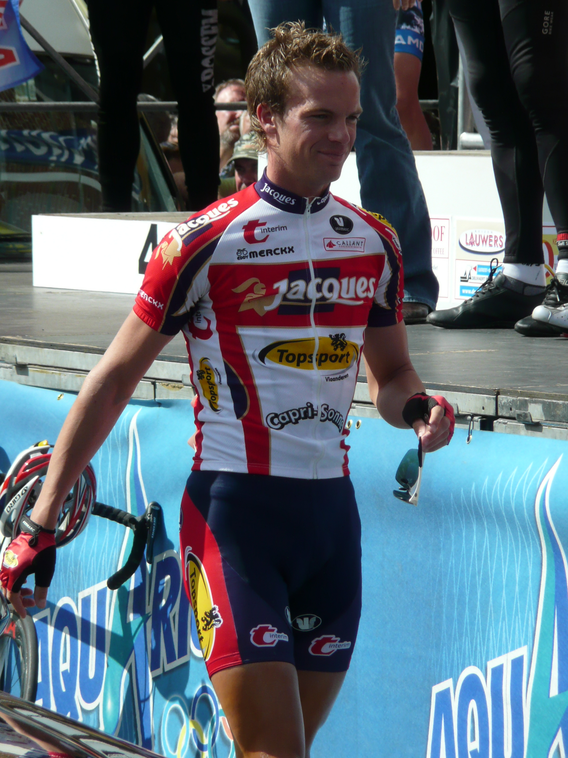 Iljo Keisse bij het dernyfestival in Wetteren 2007